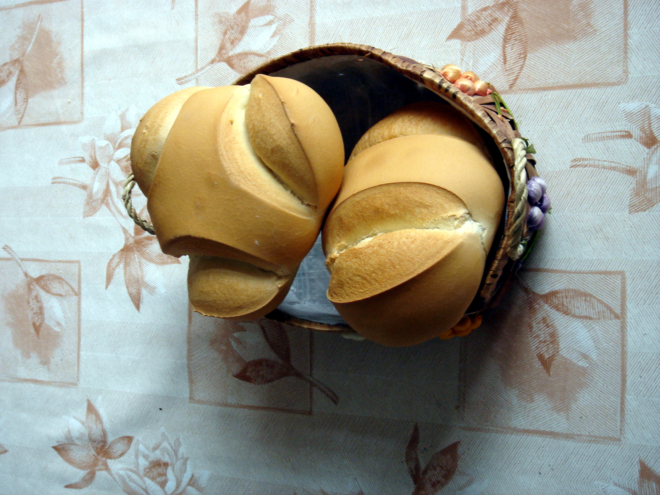 Pan de orejas. Pan de dos y tres orejas. Colmenar de Oreja. Madrid. España